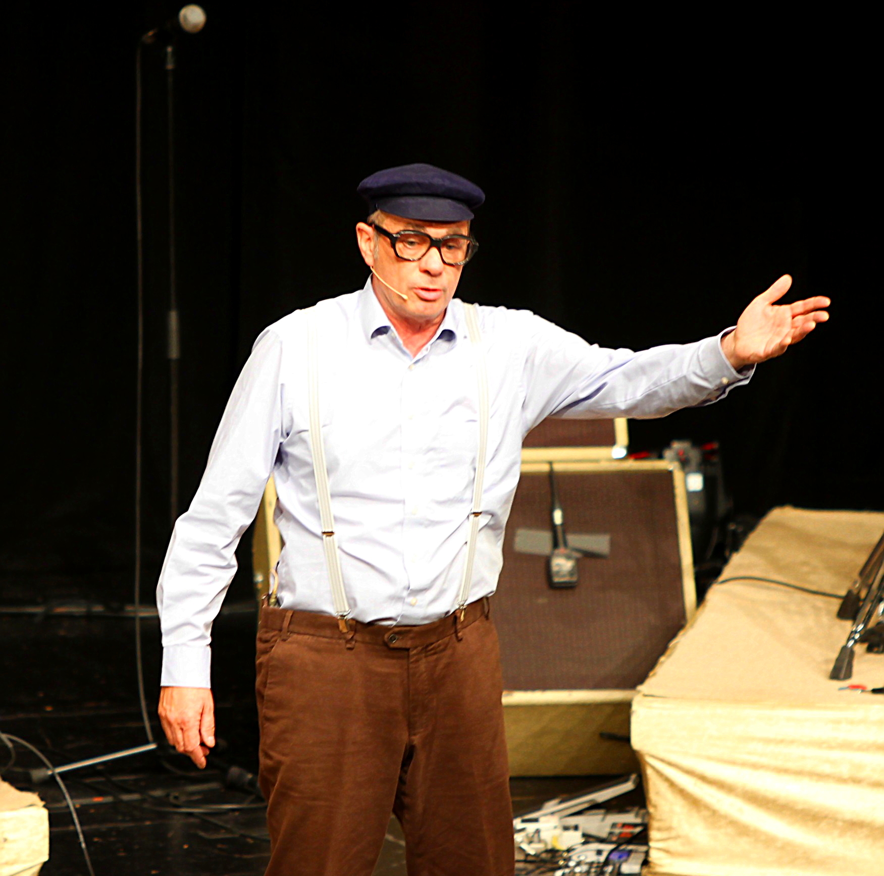 Herbert Knebel am 14.November in Velbert (c) Stefan Rittershaus